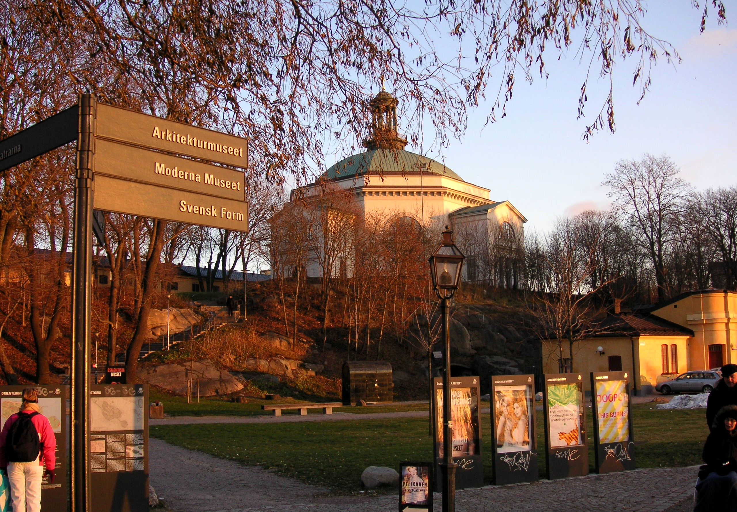 Skeppsholmen i Stockholm, Skeppsholmskyrkan i bakgrunden